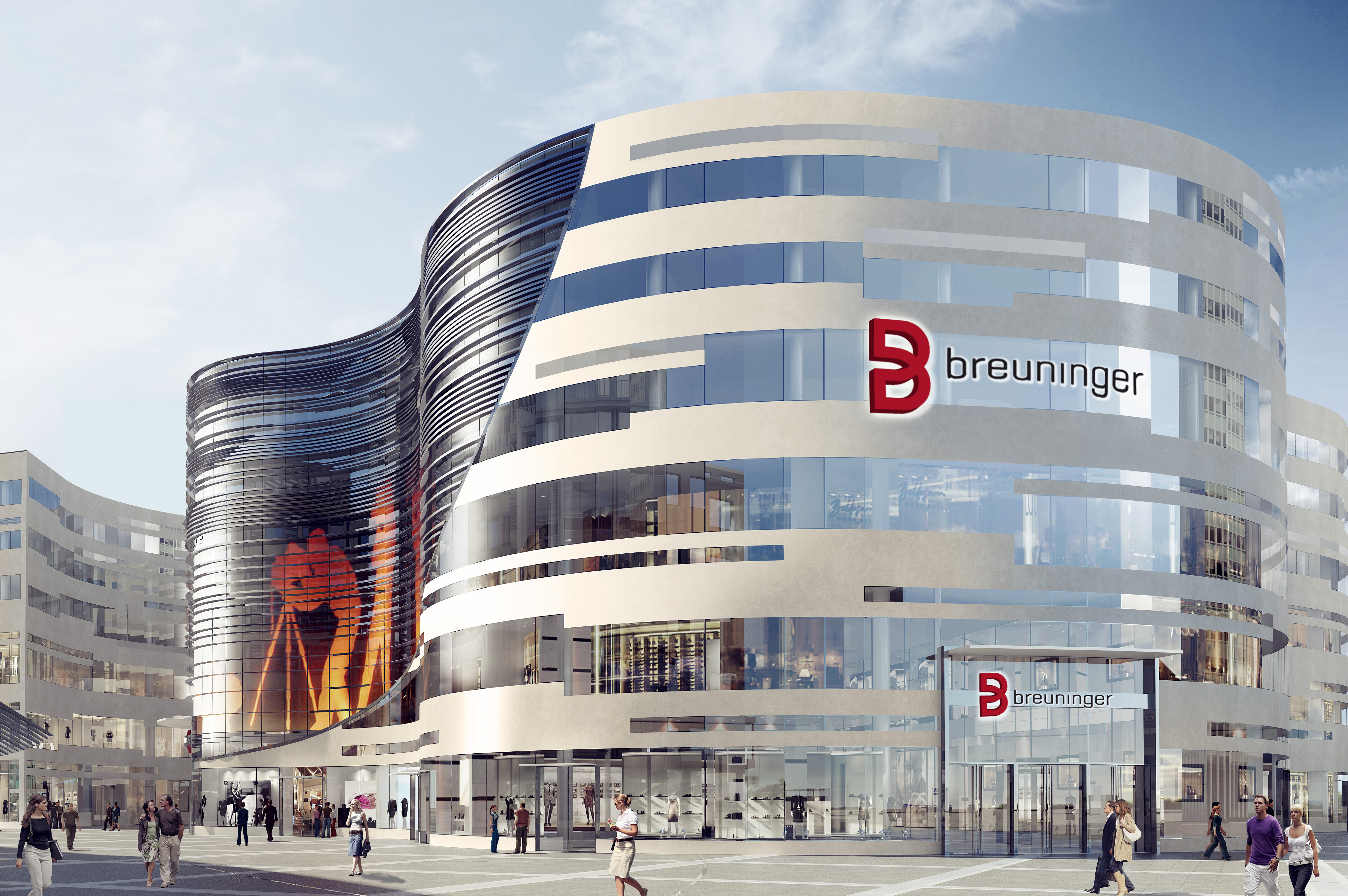 Фассад торгового дома "Бройнингер" в Дюссельдорфе